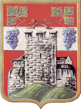 Erstes Vaduzer Gemeindewappen, von 1932 bis 1978 verwendet